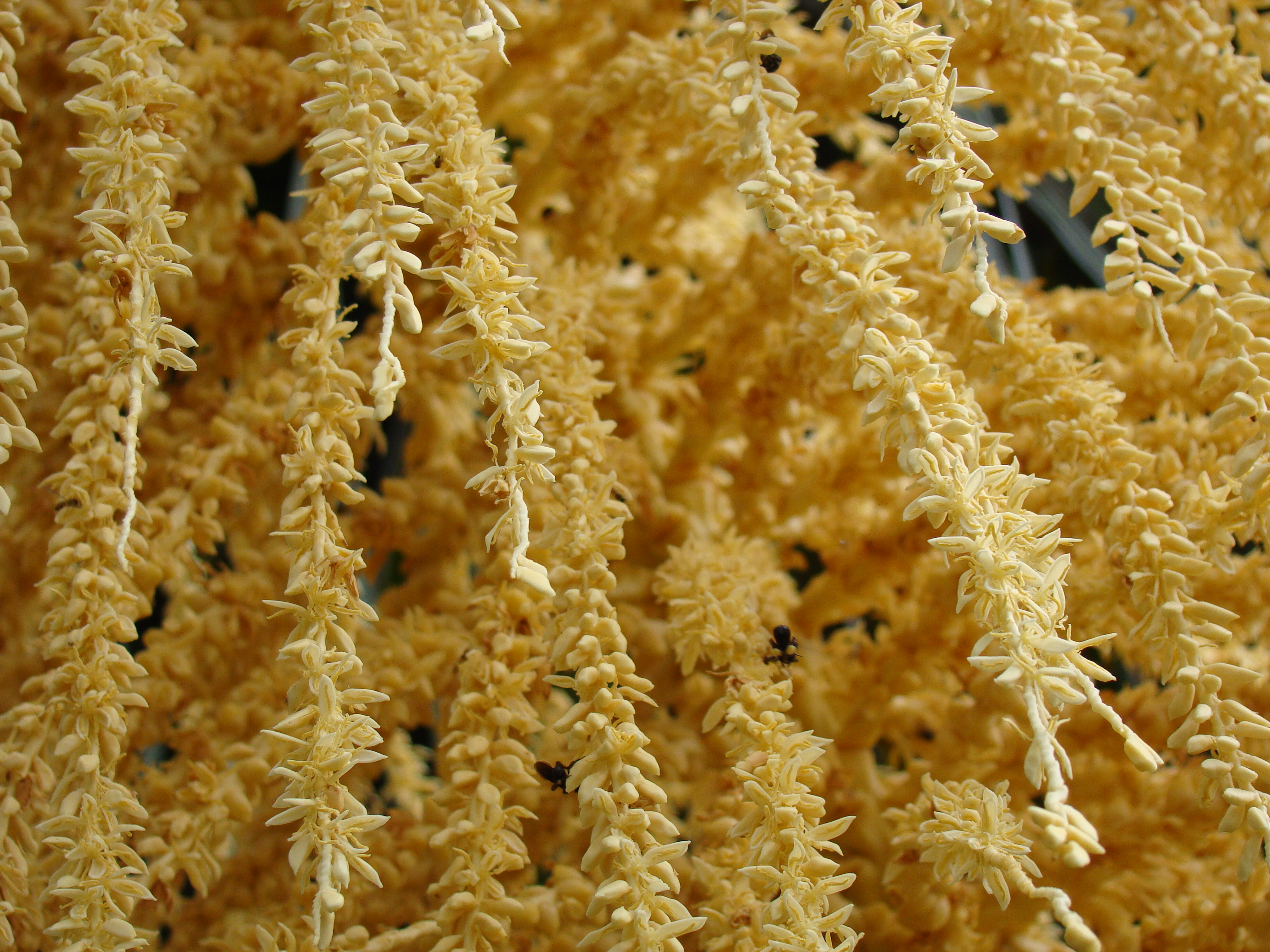 Ceret s paulo